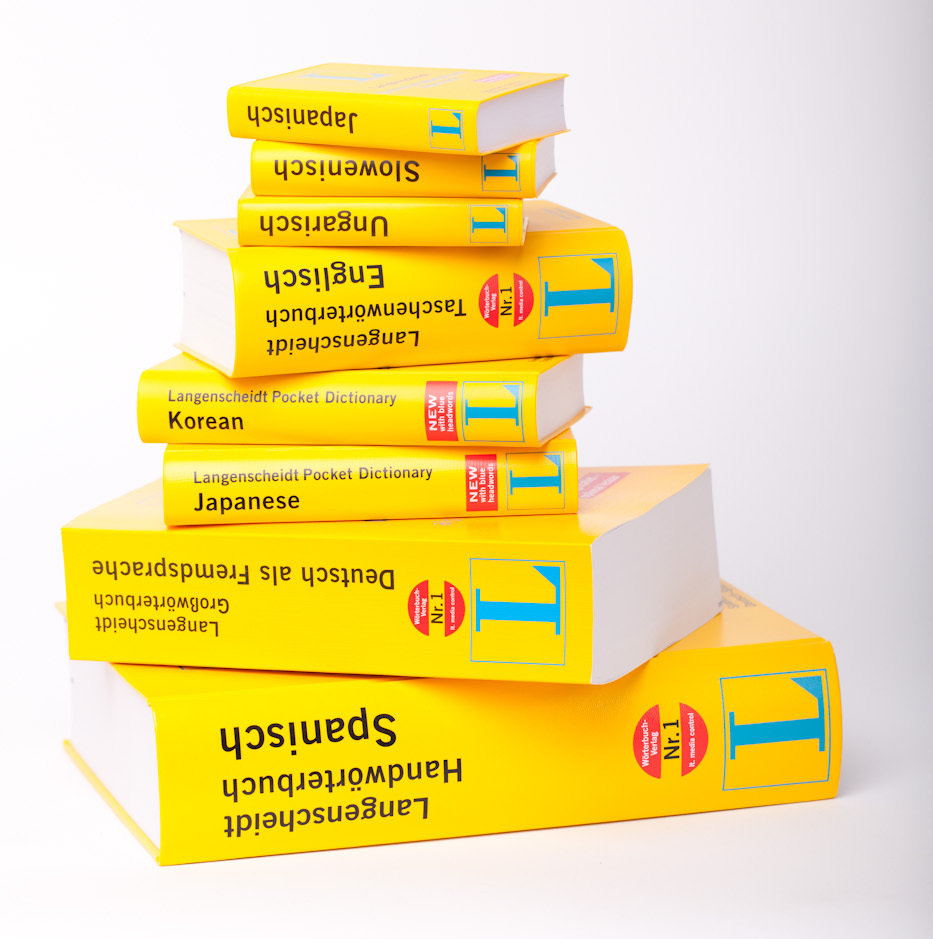 Wörterbuchstapel Langenscheidt